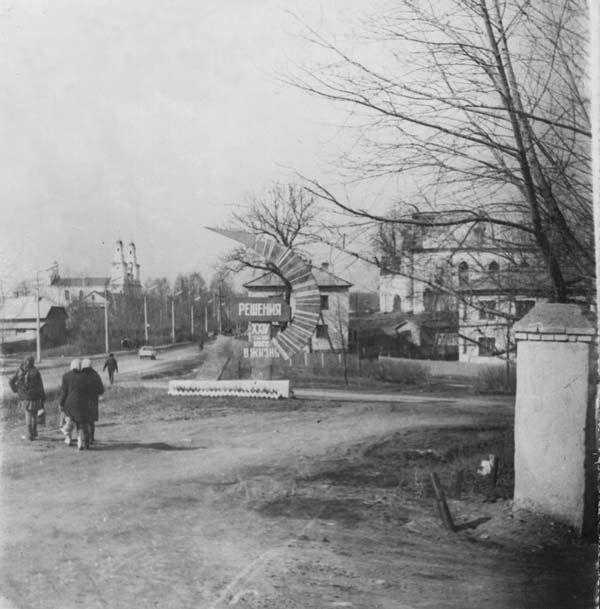 Беларуская (тарашкевіца): Талачын. Царква (да надбудовы купалоў-цыбулінаў) і касьцёл.